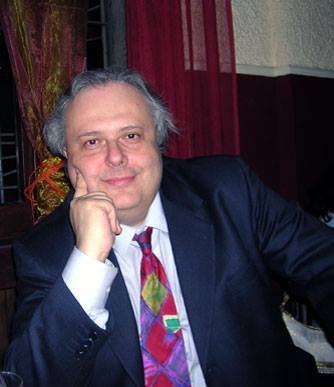 Franco Manzoni